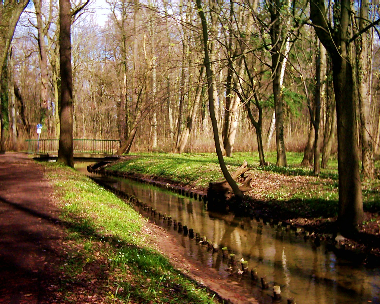 Schlossparkbrücke IV vom Pankewanderweg in das Parkinnere im Schlosspark Berlin-Buch. In Standardbauweise: über einem Stahlgerüst befindet sich eine Betonplatte von 3 Meter Breite und 4 Meter Länge, die den Lauf der Panke überspannt.